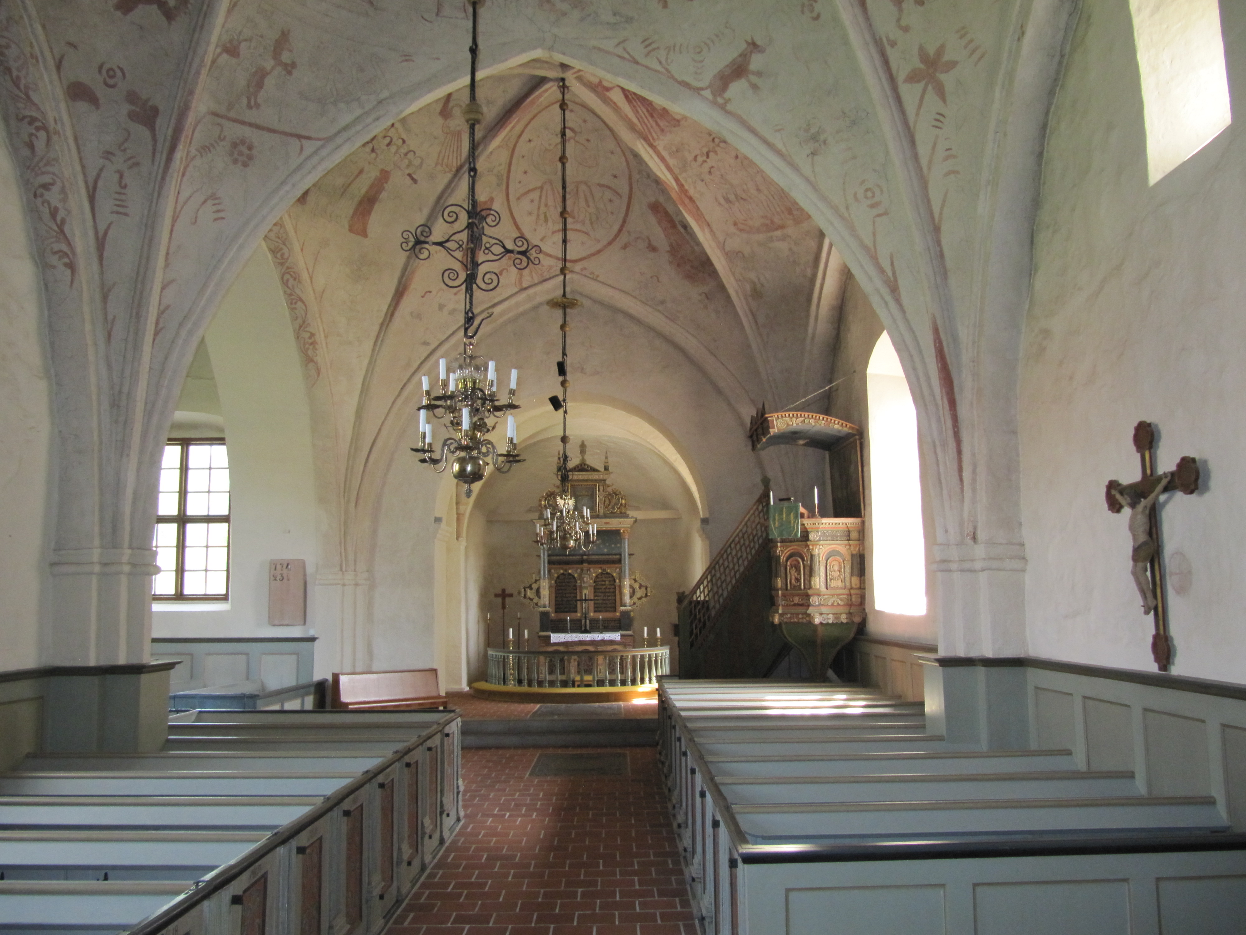 Kyrkorum i Fjälkinge kyrka